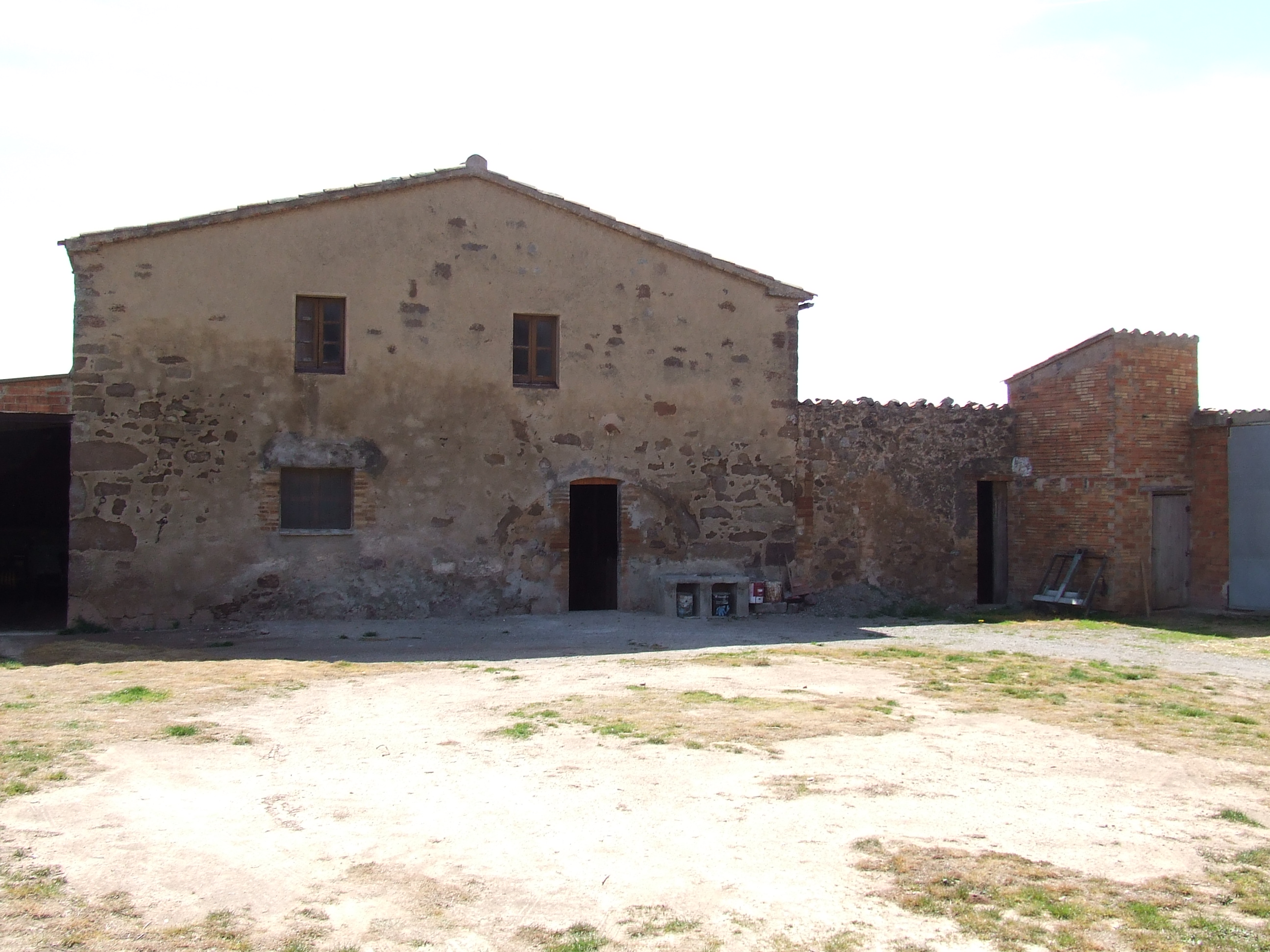 La Crossa (l'Estany, Moianès)